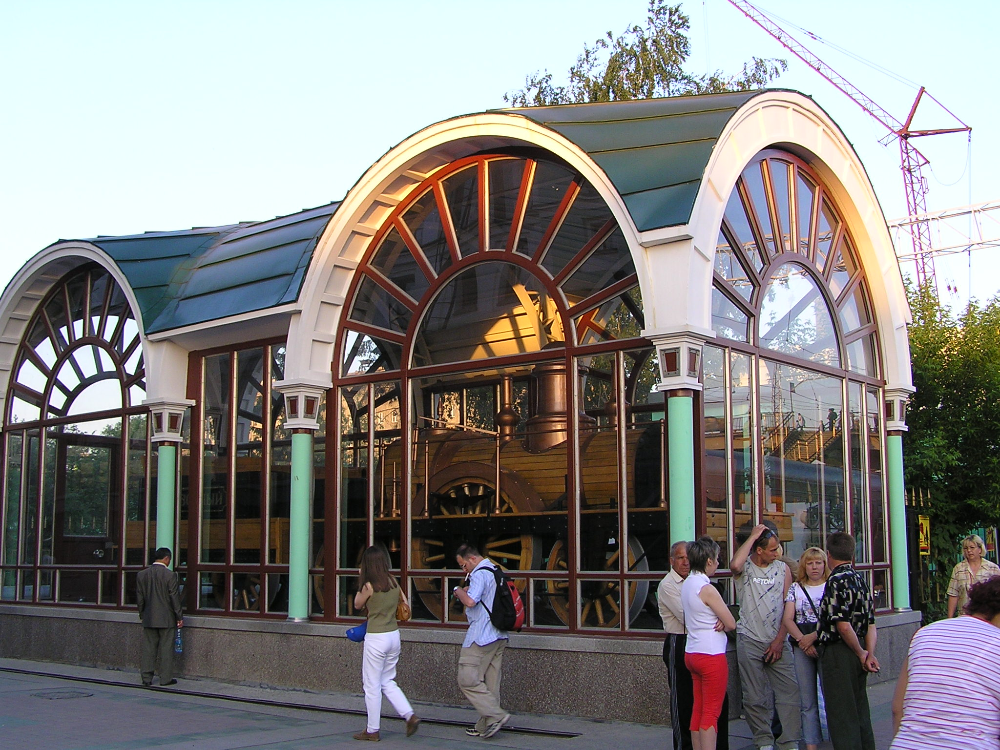 Реплика паровоза «Проворный» на вокзале Новосибирск-Главный